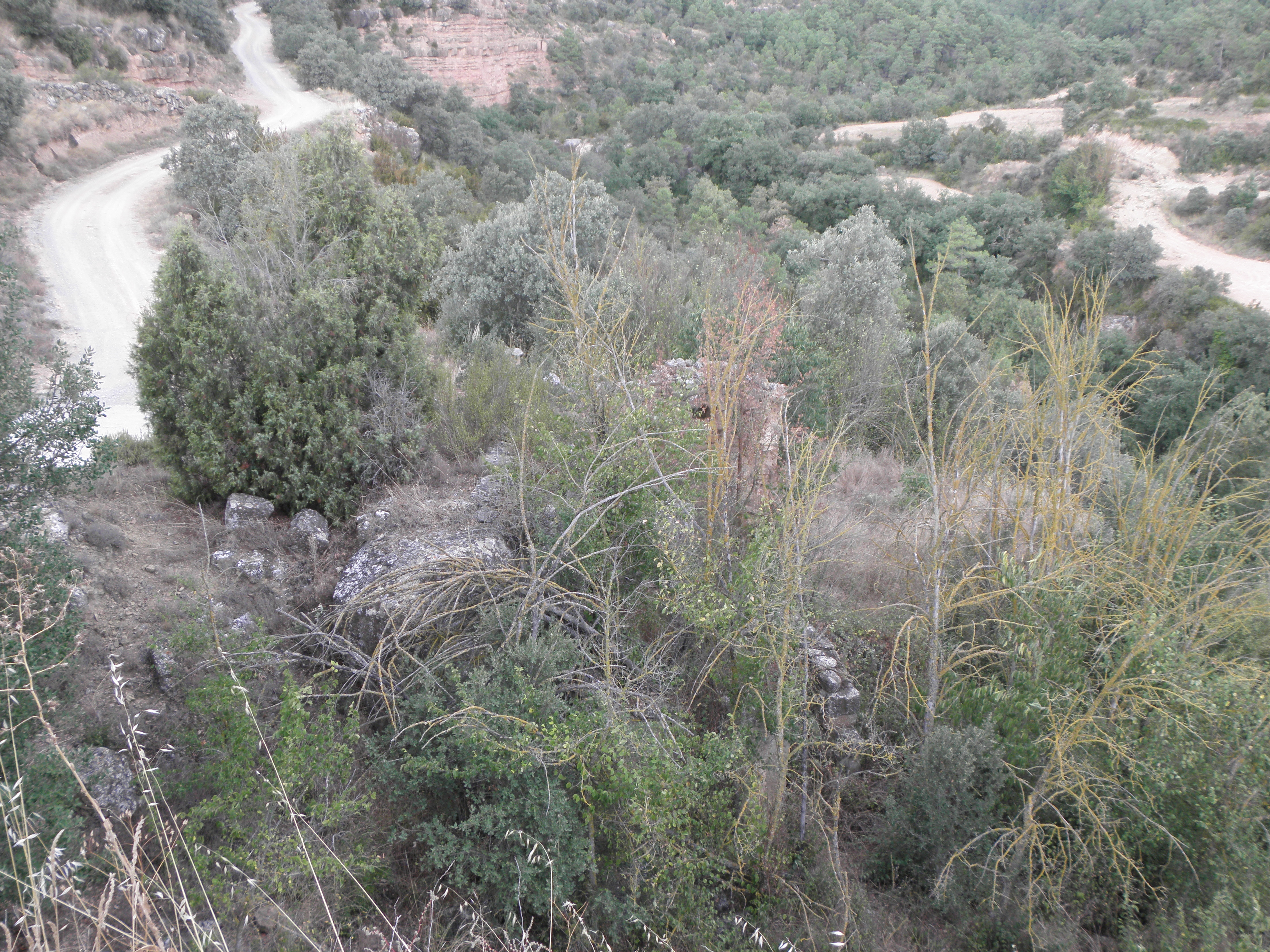 Les restes de Cal Sargantalla al peu de la torre de guaita del nucli de Sallent (Pinell de Solsonès) vistes des del peu de la torre.